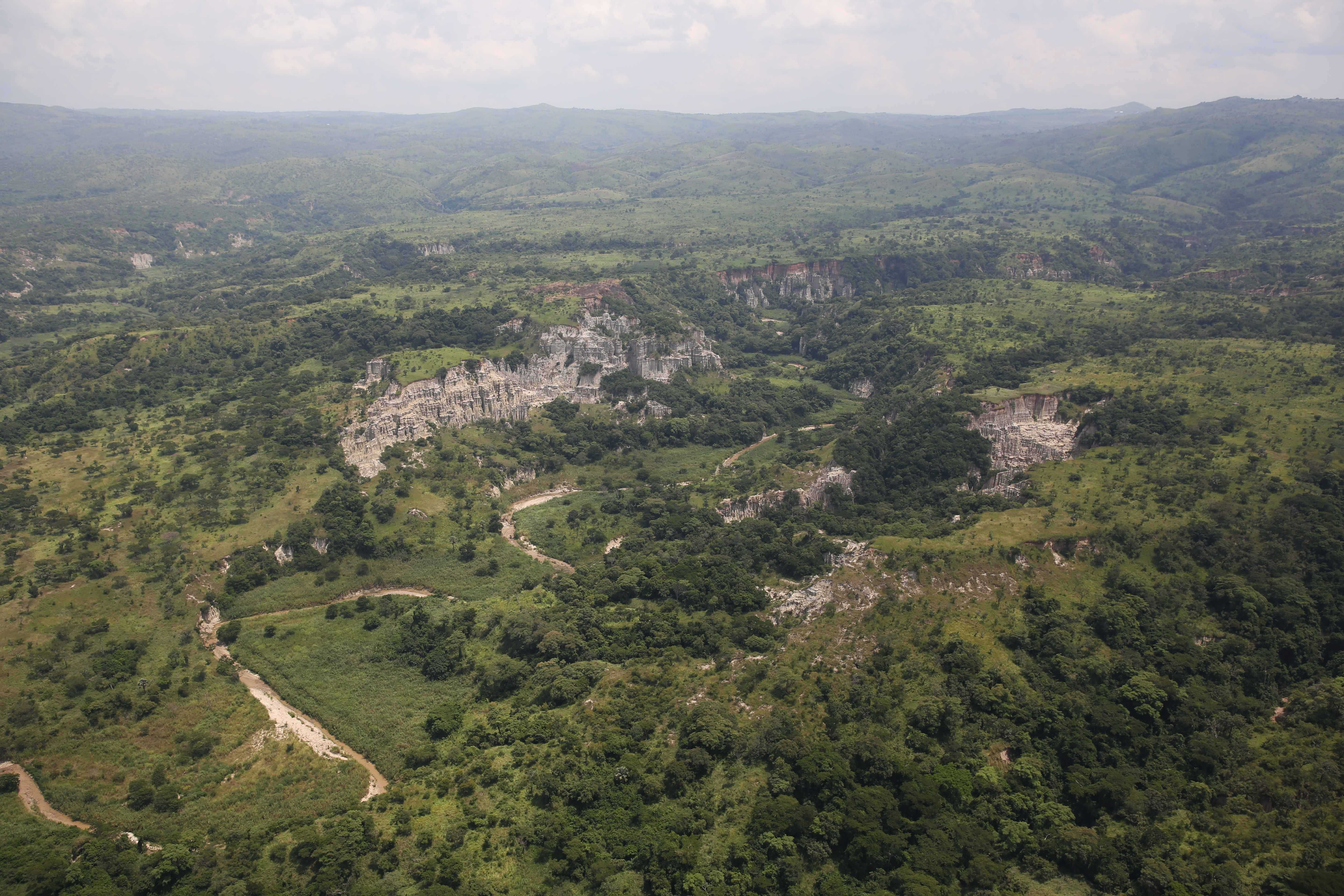 photo MONUSCO / Abel Kavanagh